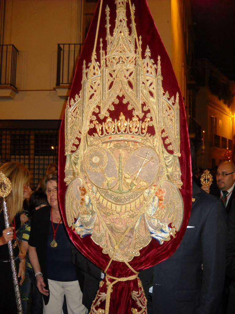 Escudo que aparece en el bacalao de la Hermandad